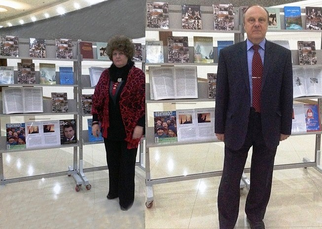 Дубовицкий Виктор Васильевич - ученый-историк, публицист, писатель, общественный деятель. Дубовицкая Ирина Михайловна – журналист, публицист, писатель, члены «Совета российских соотечественников Таджикистана» 2007-2014гг.